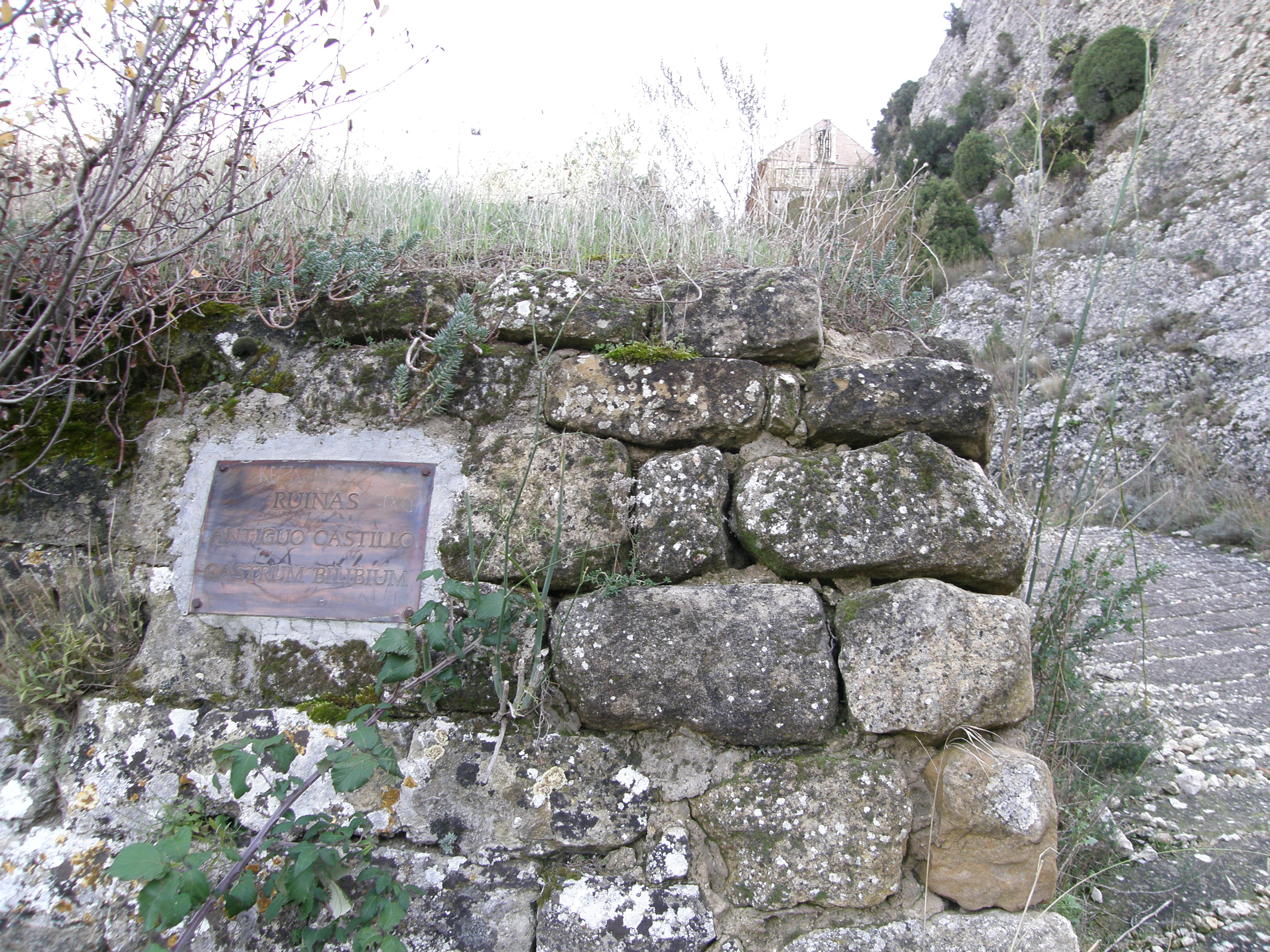 Ruinas del antiguo castillo de Bilibio cerca de la ermita de San Felices (LaRioja, España)